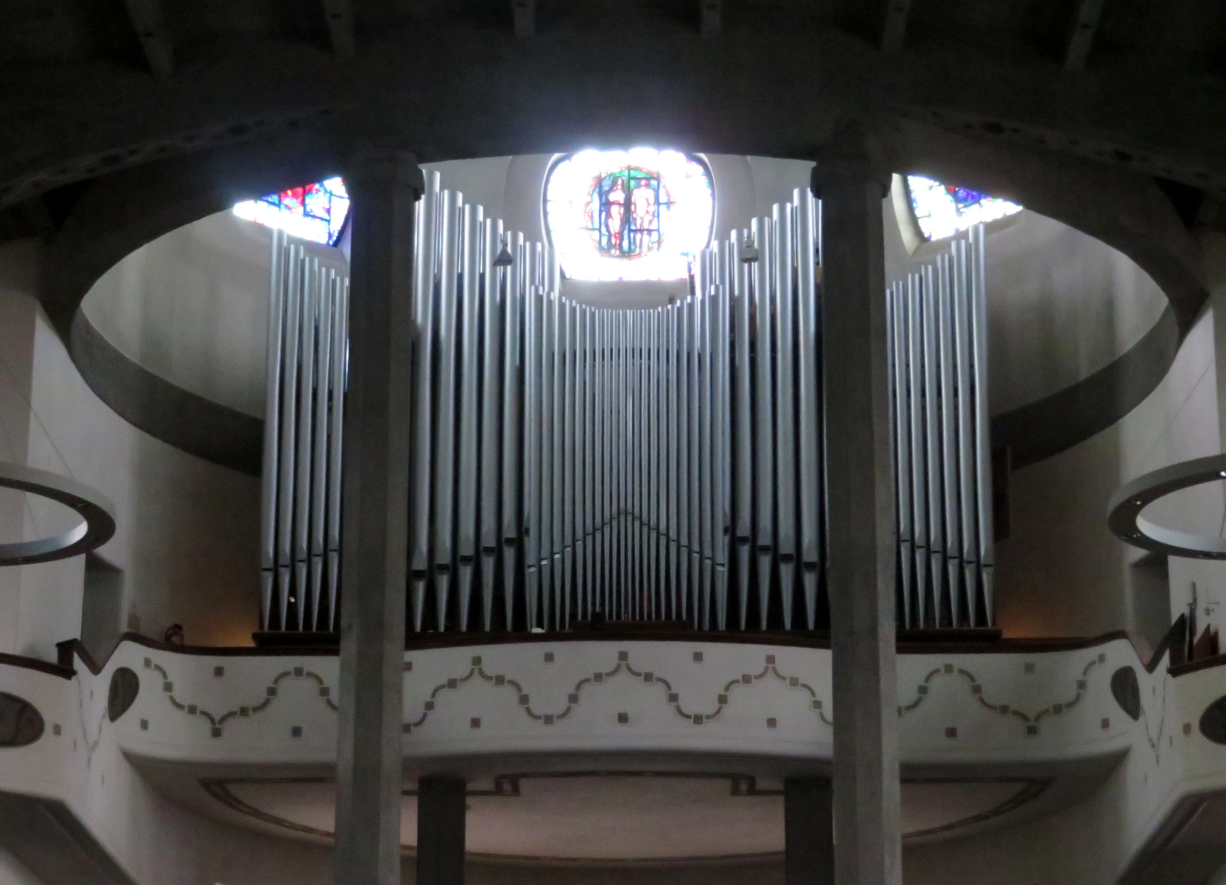 Pauluskirche Ulm Orgel der Giengener Orgelmanufaktur Gebr. Link, op. 535